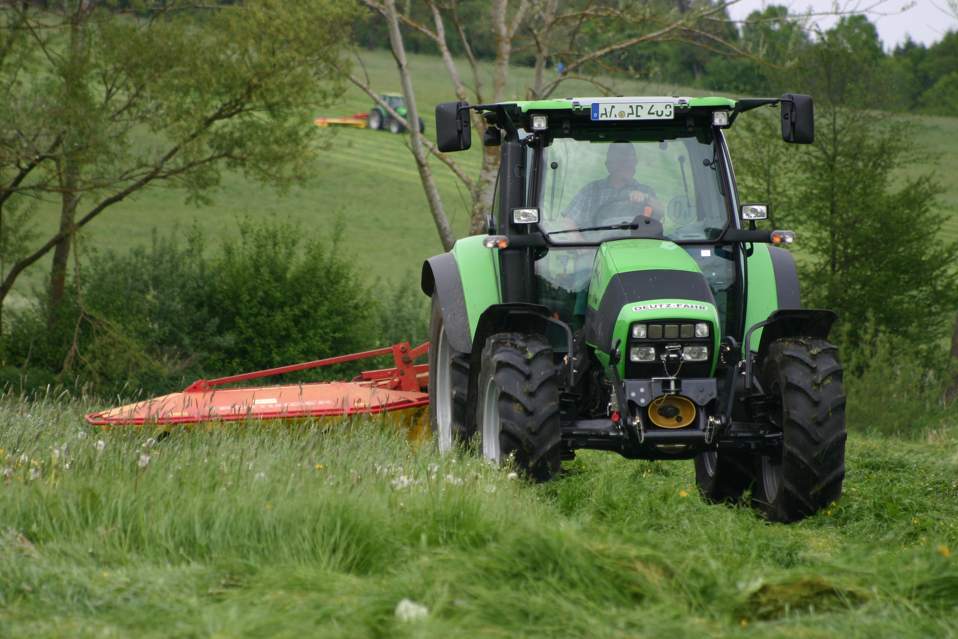 Grasmahd mit einem Deutz-Fahr-Traktor Agrotron … mit Pöttinger-Mähwerk